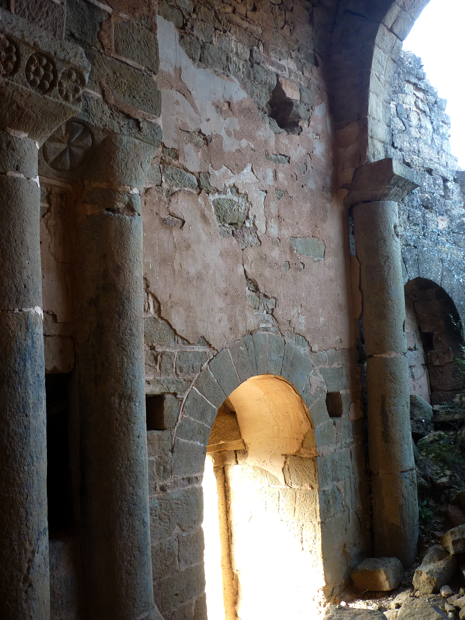 Església de Sant Joan Baptista de Torreblanca (Ponts): arcs torals